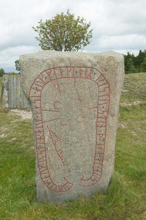 Inskriften lyder: Trotte och Rolev och Östen och Nase och Glägge, de reste denna sten efter Arnsten, sin fader. Motiv: Sö200 Åsa Nyckelord: Runor Kategori: Runristning/runsten Inskriften lyder: Trotte och Rolev och Östen och Nase och Glägge, de reste denna sten efter Arnsten, sin fader.